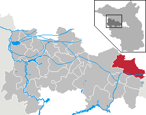 Schönwalde-Glien in Brandenburg (Country) - District Havelland